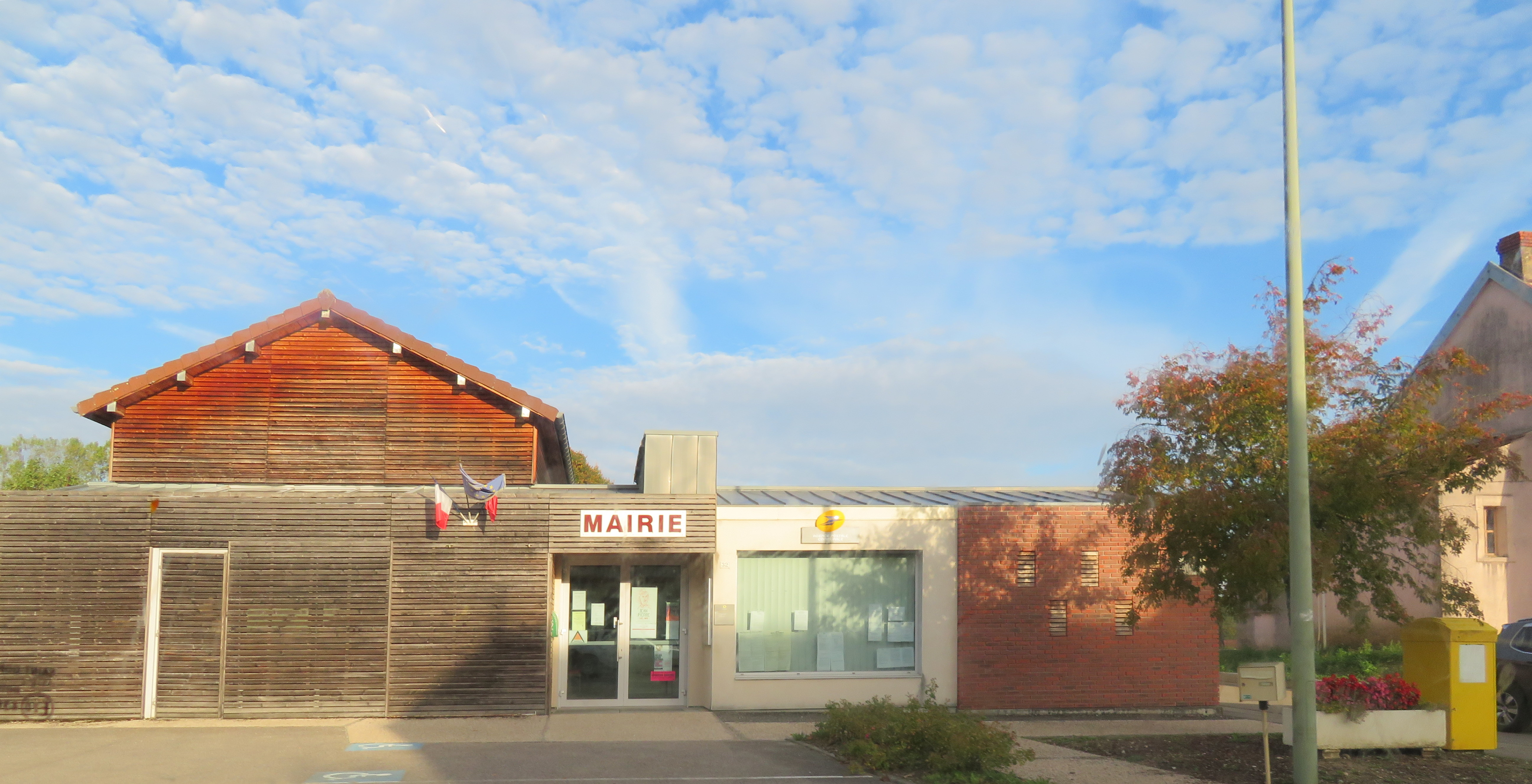 Mairie de Chaumergy (Jura).